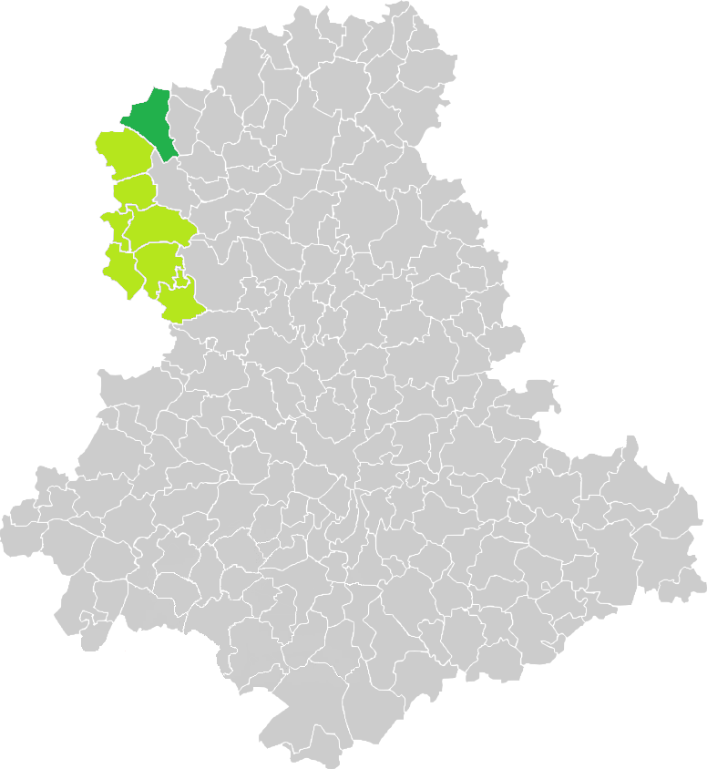 Carte de situation de la commune de Bussière-Poitevine (en vert foncé) dans le votre Canton (en vert clair) sur une carte des communes de la Haute-Vienne